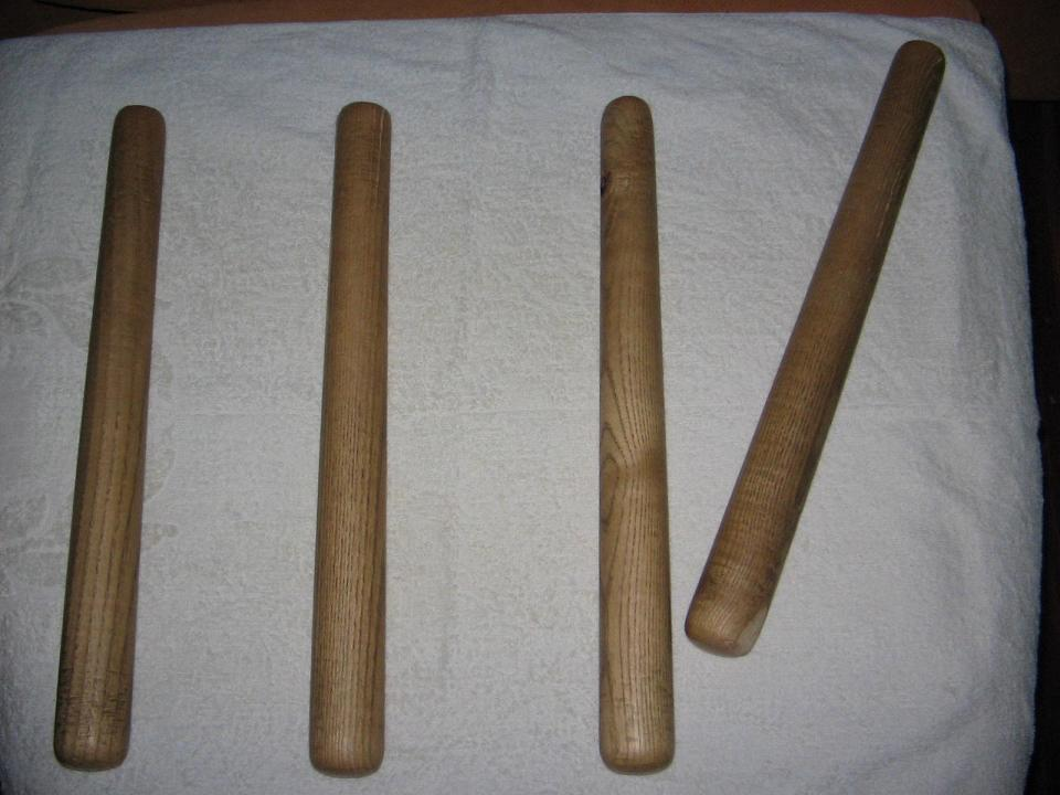 Four txalaparta sticks